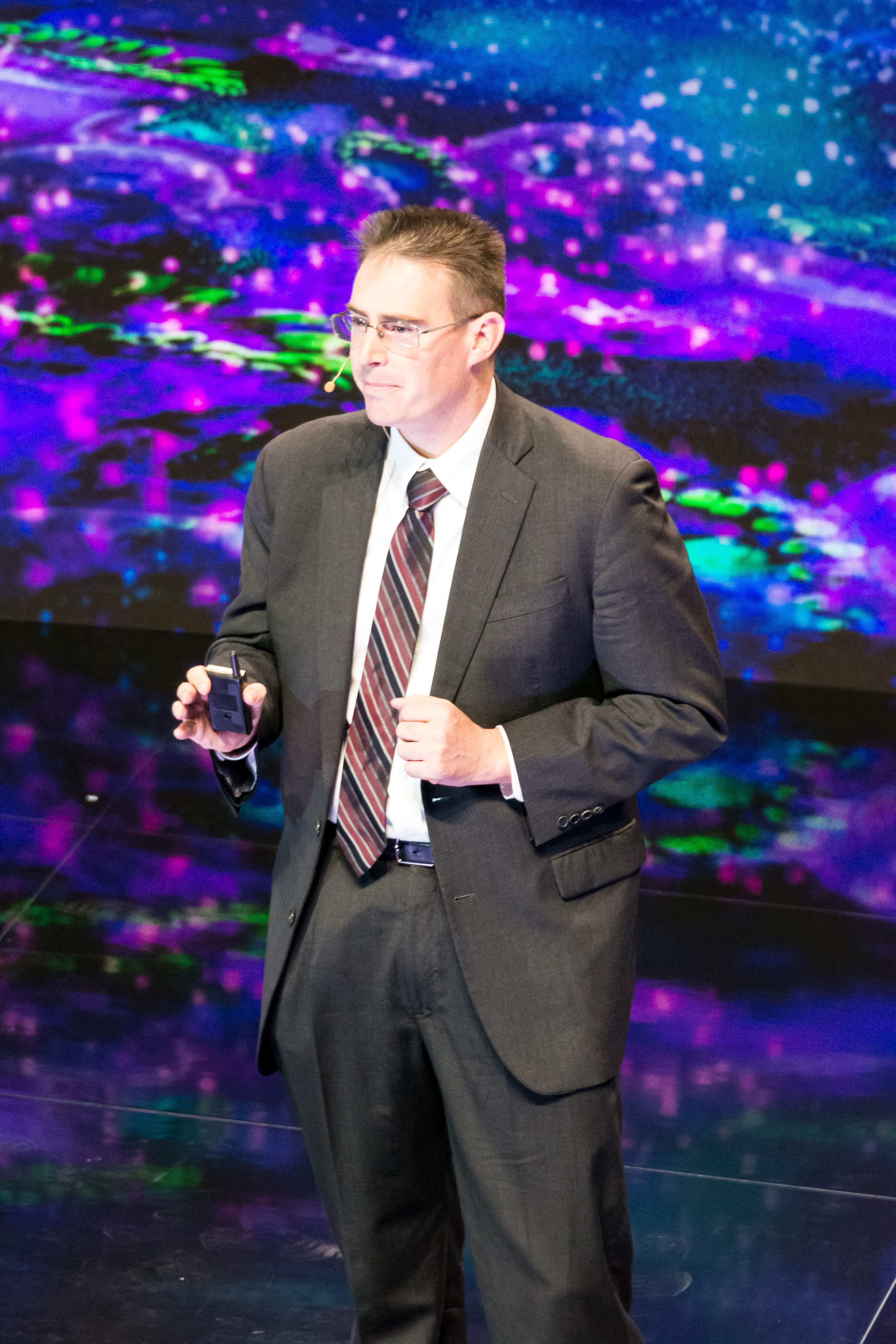 Congreso Futuro 2020, Rob Knight